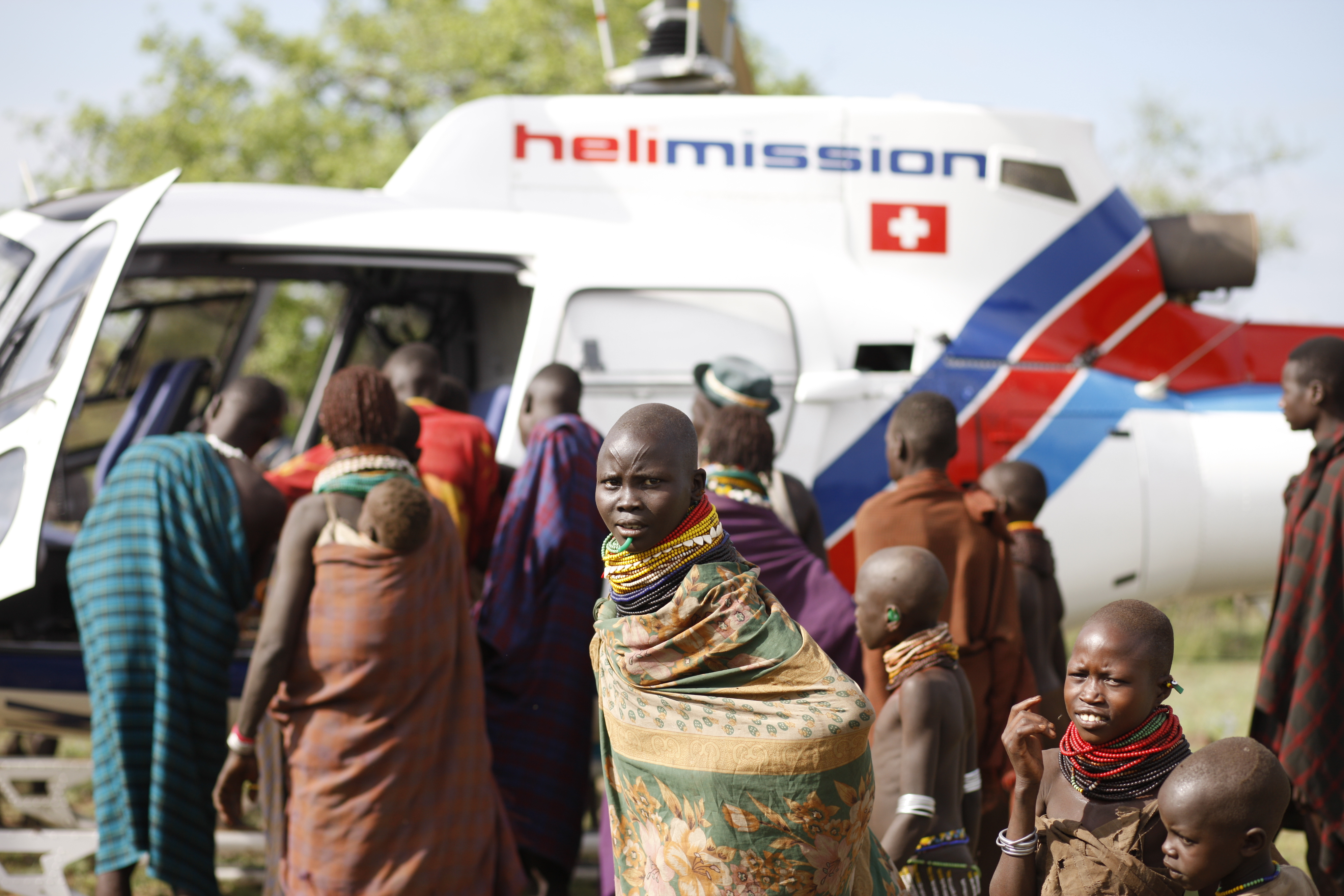 Helimission Helikopter in Äthiopien - Medevac